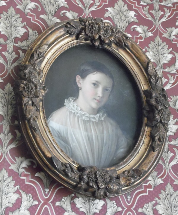 С.И. Грибков - живописец, уроженец Касимова